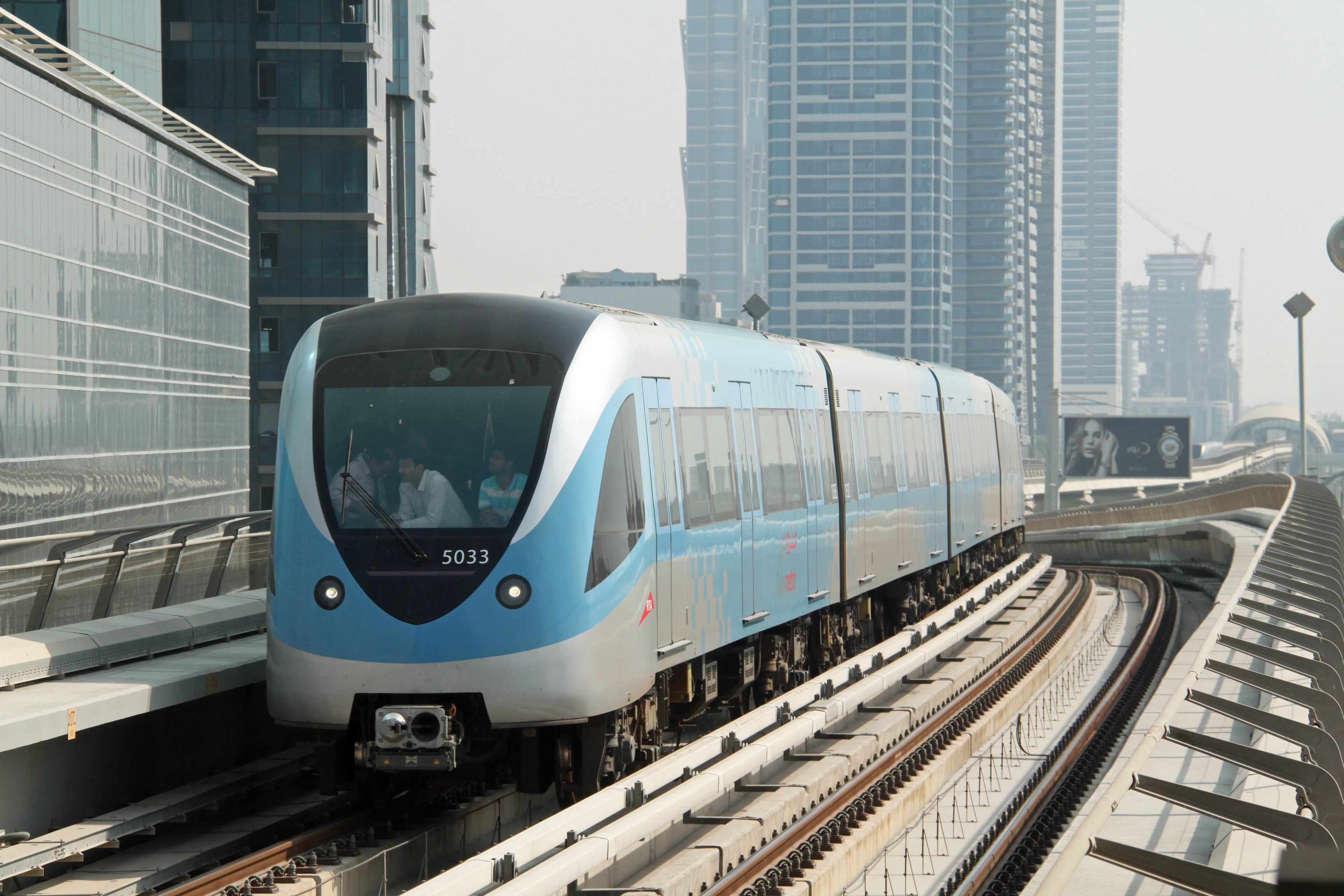 Een treinstel van de metro van Dubai